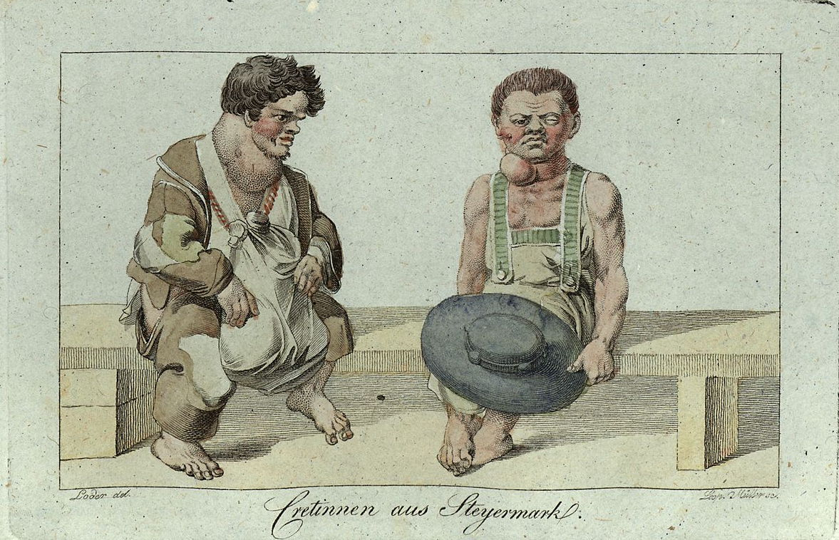 Oesterreichs Tibur, oder Natur- und Kunstgemählde aus dem oesterreichischen Kaiserthume Verlag Doll, Wien 1819